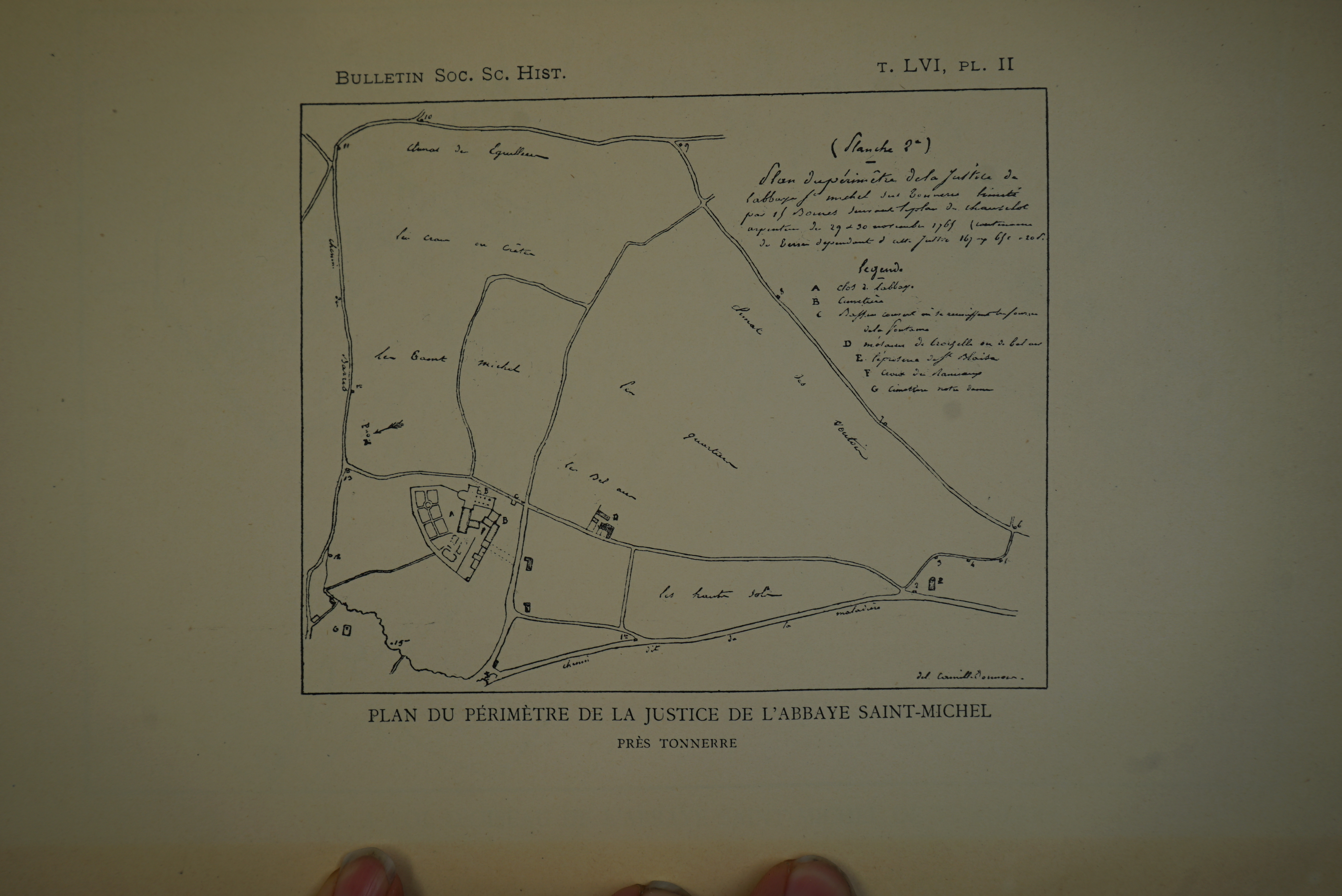 plan de Tonnerre par Dormois Camille .